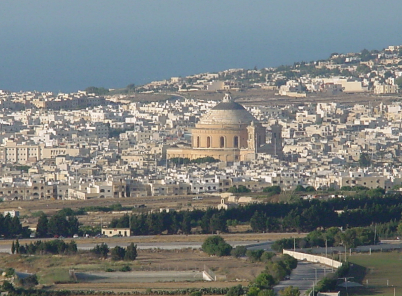 MostaAufMalta2000